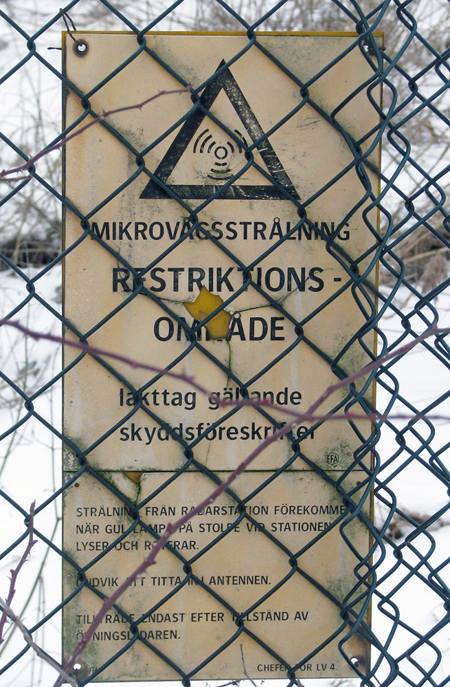 En gammal varningsskyllt för mikrovågsstrålning. Ystad Sandskogs övningsområde.